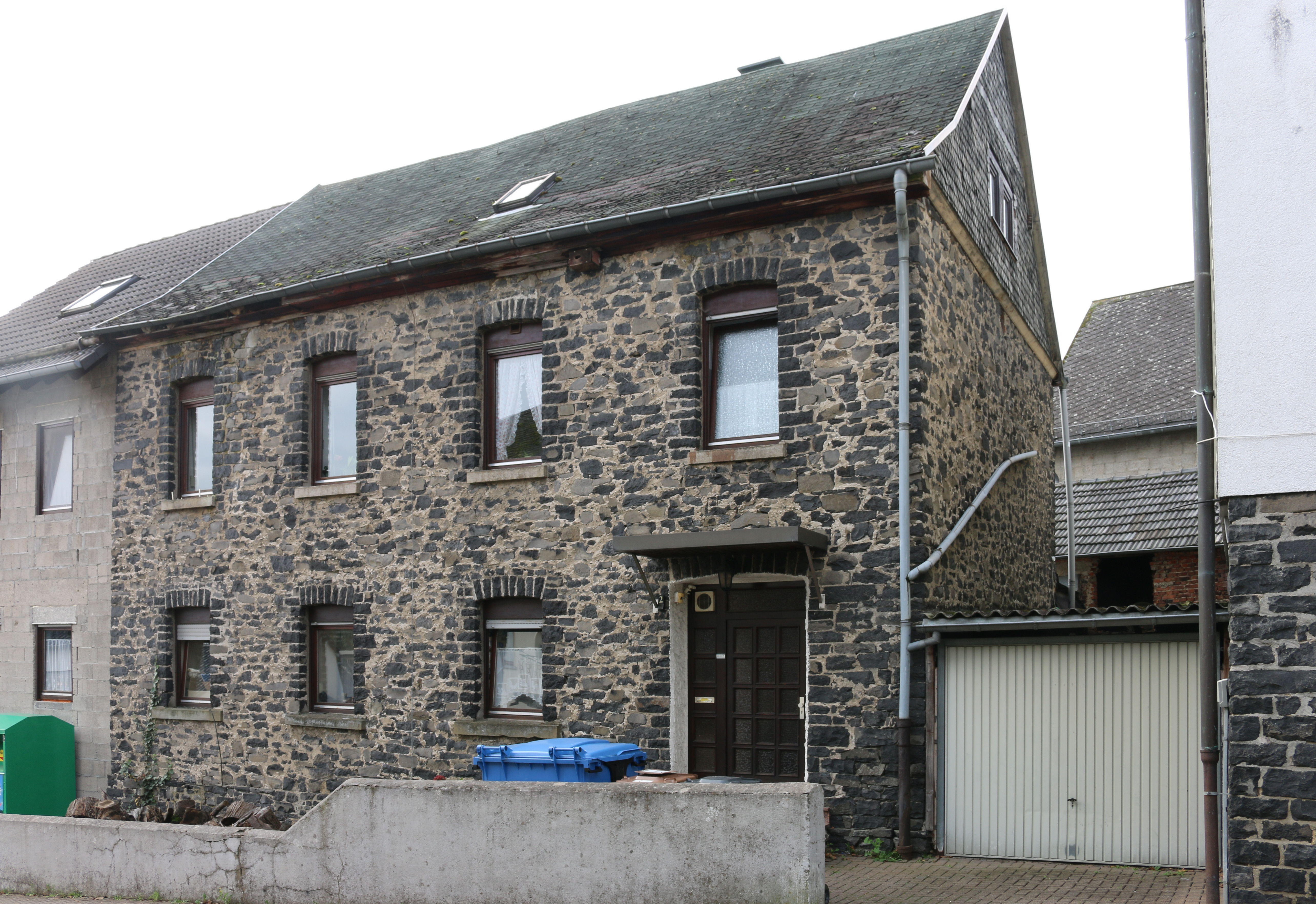 Fussingen, Westerwald: Das Gebäude der ehemaligen Volksschule, errichtet frühes 19 Jahrhundert